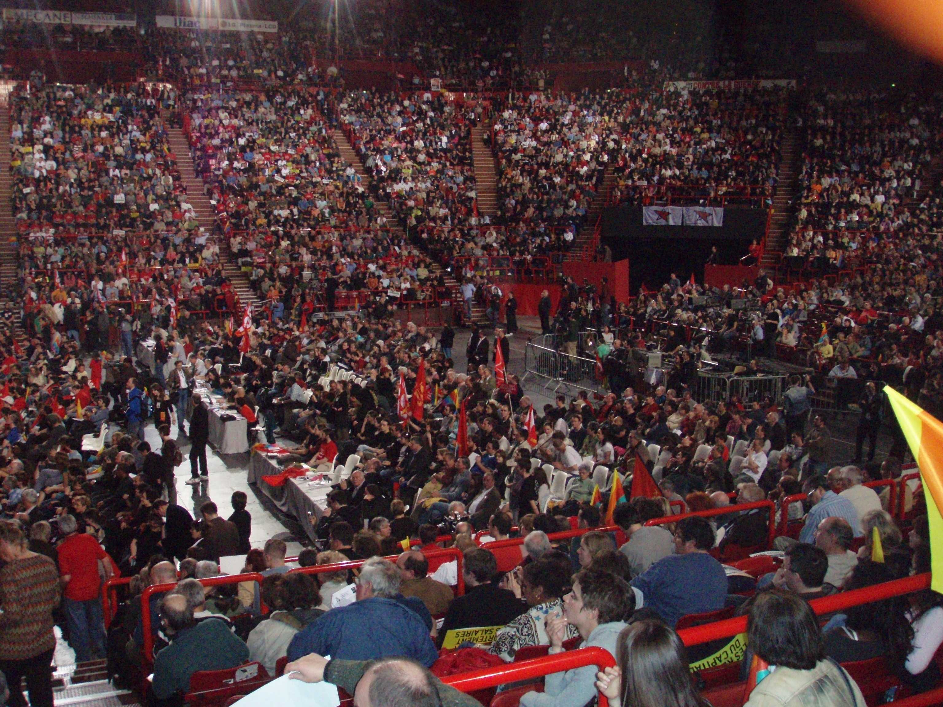 Meeting à Bercy du PCF pour la Présidentielle 2007